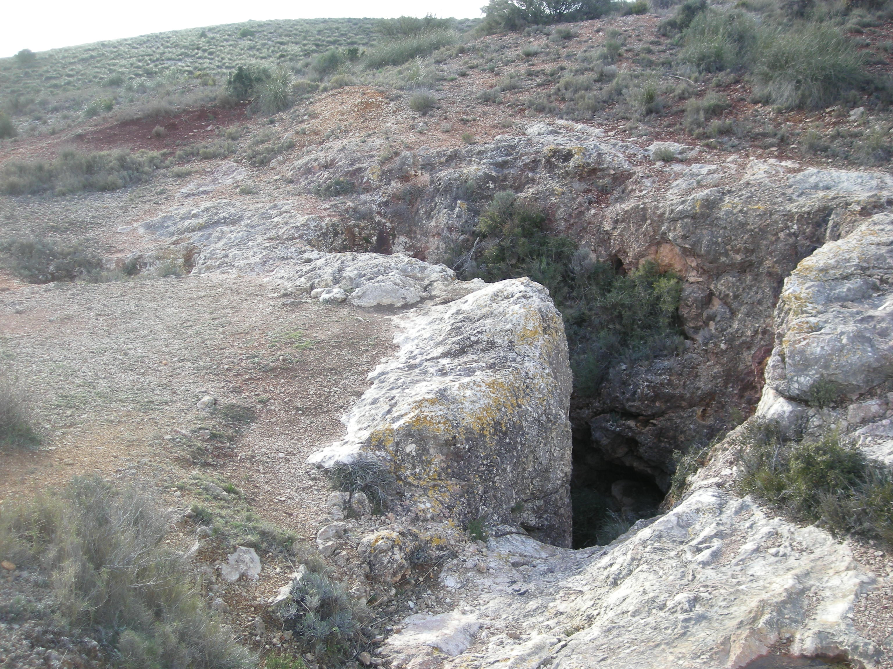 Minica de los Colores, en uno de los puntos más altos de la Sierra de la Villa (sendero PR-CV 312, Villena).